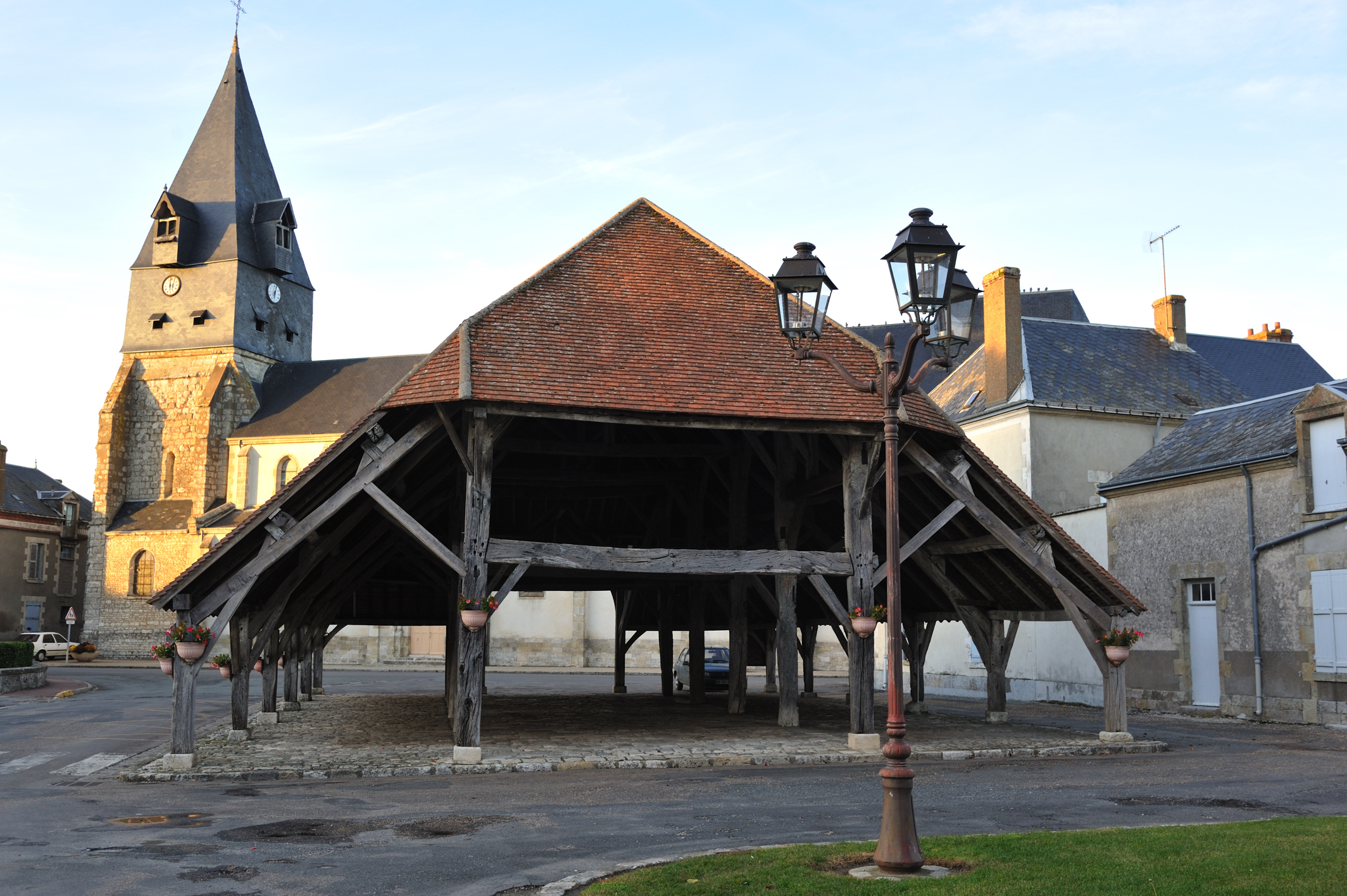 Halles, Aschères-le-Marché, Loiret, France